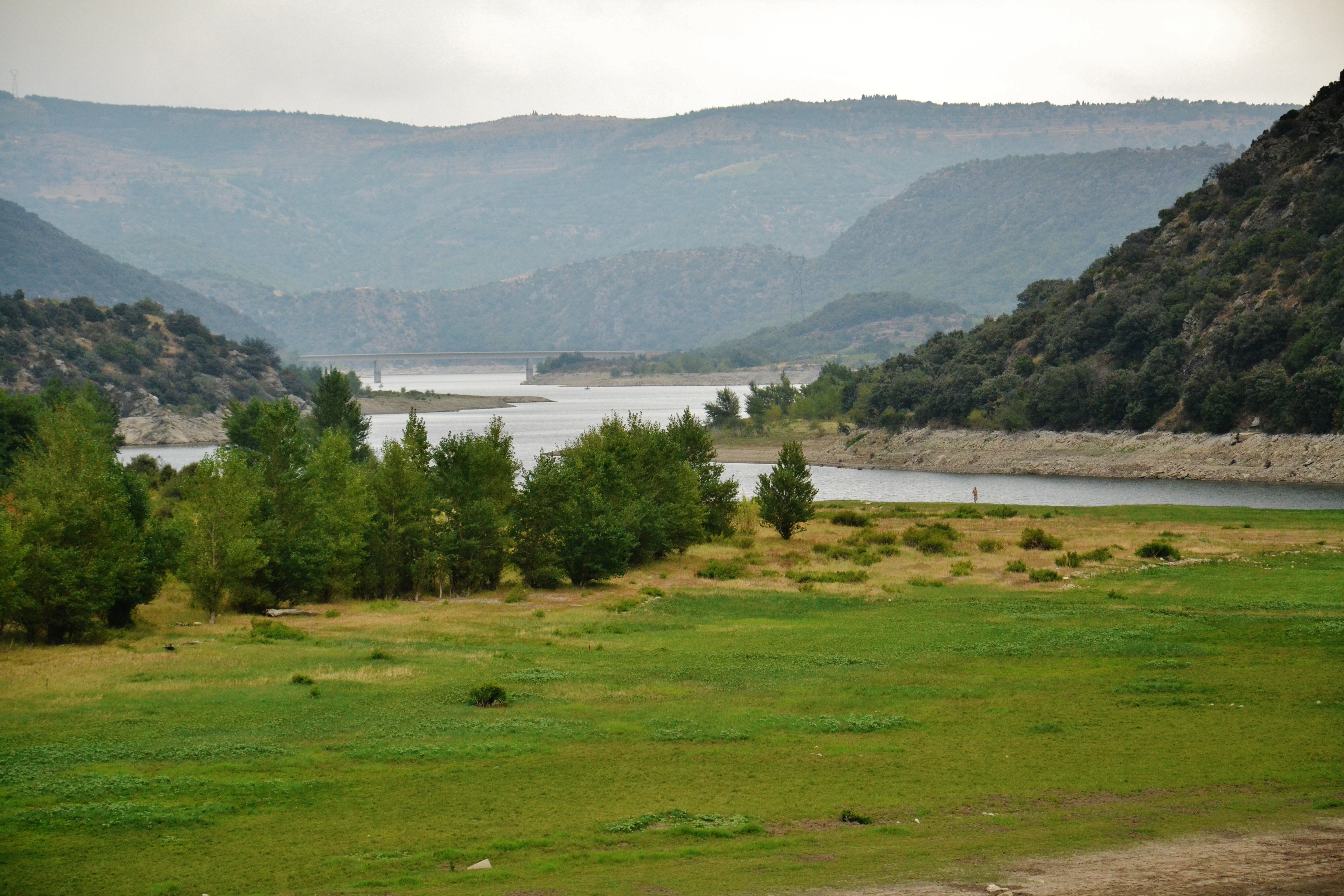 Le lac du barrage de Caramany, depuis la rive droite vers l'aval (Pyrénées-Orientales, France)